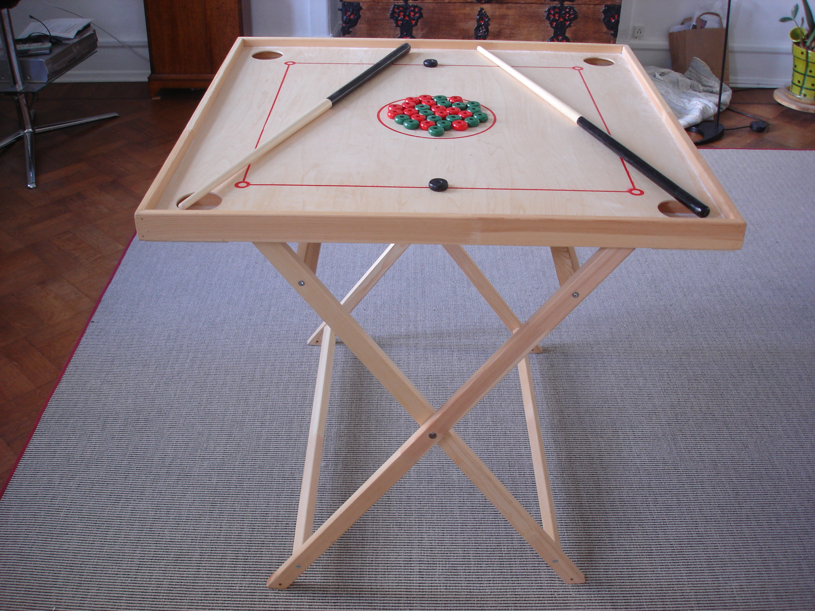 Bobspil